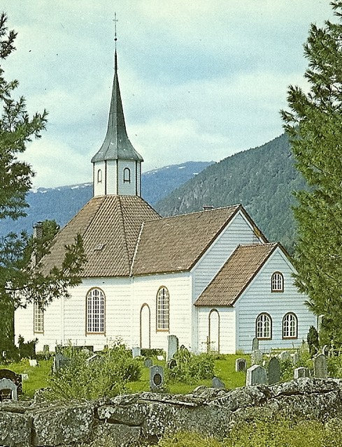 Innvik kirke